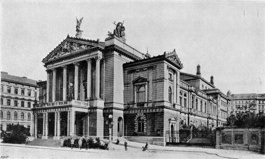 Budova Nového neměckého divadla v Praze